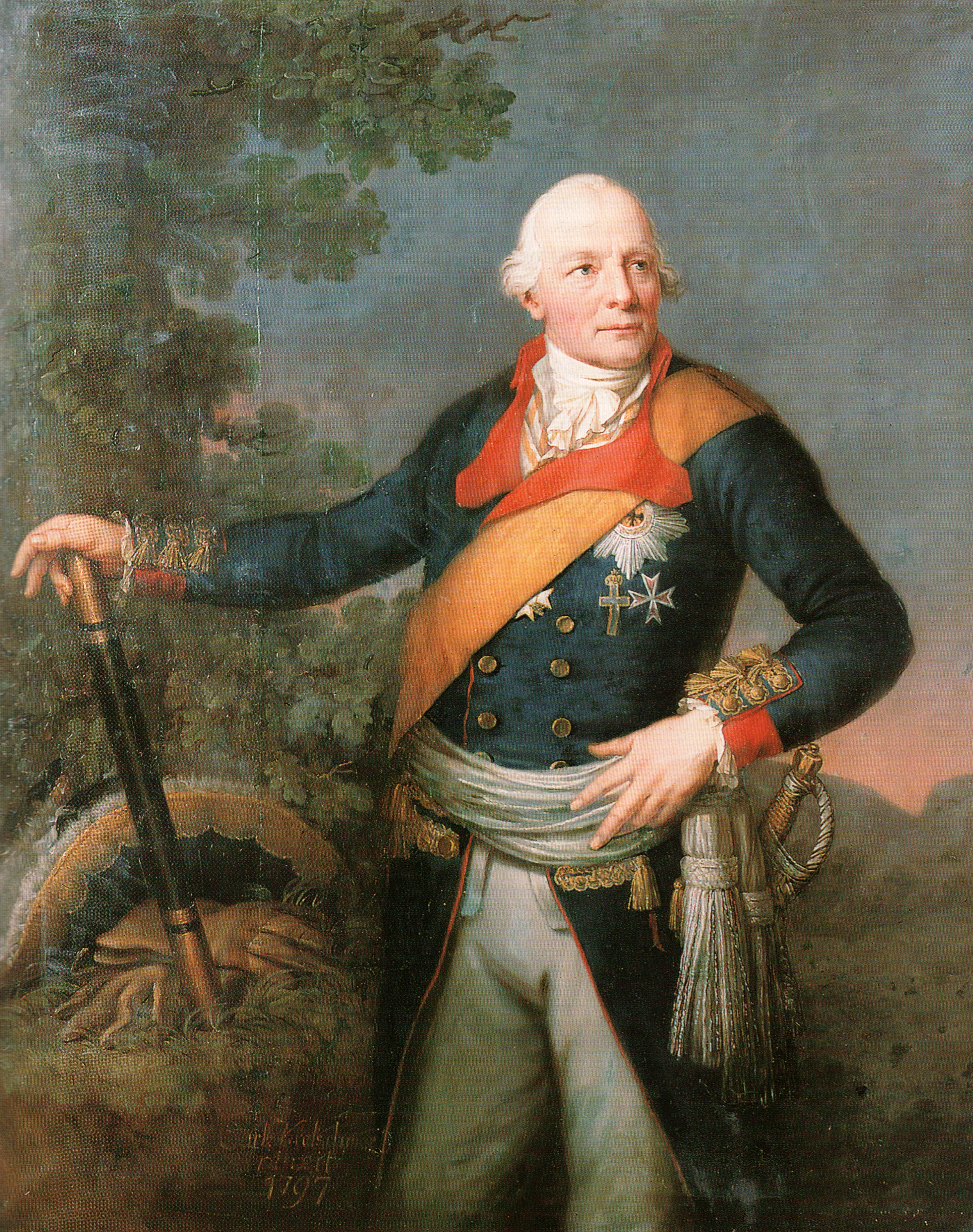 Bildnis von Generalfeldmarschall Wichard Joachim Heinrich von Moellendorff.